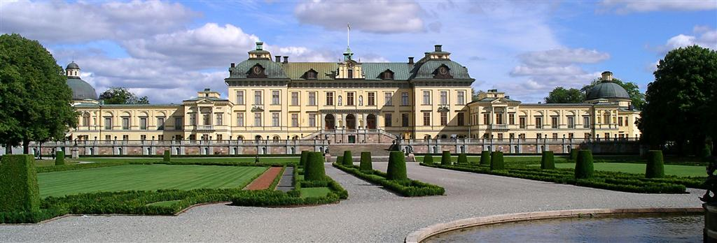 Foto: Tor Svensson 18 januari 2006 kl.21.30 Kemitsv 1024x348 (84735 bytes) (Foto: Tor Svensson GFDL )